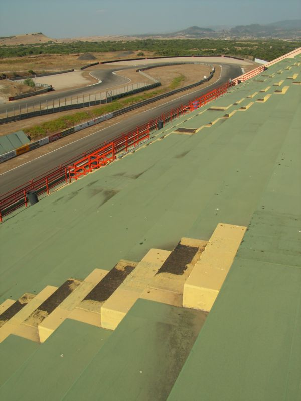 La realizzazione in Sardegna di un Autodromo a norme FIA omologato dalla CSAI (Auto) e dalla FMI (Moto) E' la prima ed unica di tutta la Regione, da parte di una società altamente professionale, rappresenta di per sé un evento di rilevanza assoluta. Da sempre si auspica l'integrazione dell'offerta turistica della Sardegna con iniziative che vadano al di là della mera gestione del business "sole-mare" e molto deve essere ancora fatto in tal senso. La possibilità di disporre di una struttura idonea alla organizzazione di gare, competizioni, eventi incentrati sugli sport motoristici appare di grande interesse alla luce in termini di richiamo di presenze turistiche e ricaduta di immagine sull'intera Regione. Il momento assai favorevole vissuto dagli sport motoristici sull'onda dei prestigiosi risultati ottenuti dagli sportivi Italiani nelle manifestazioni internazionali fa sì che attualmente l'organizzazione e la gestione di manifestazioni automobilistiche/motociclistiche rappresenti un vero e proprio business dalle grandi potenzialità anche in Sardegna. I punti di forza dell'iniziativa proposta sono da ricercarsi: Nella unicità dell'iniziativa e della verosimile posizione di monopolista; Nella localizzazione favorevole, pressoché baricentrica ed in prossimità della principale arteria di collegamento Regionale; Nella altissima competenza specifica e professionalità dei soci; Nel momento favorevole attraversato dal settore degli sport motoristici in termini di consenso e afflusso di pubblico. I lavori di costruzione iniziati il 15 Luglio 2000 ed ultimati il 15 Marzo 2003 (data della inaugurazione) hanno reso operativo l'impianto per la felicità e per la passione degli amanti di sport motoristici. Il sogno di ognuno di questi è diventato realtà. Per informazioni contattare la direzione dell'autodromo